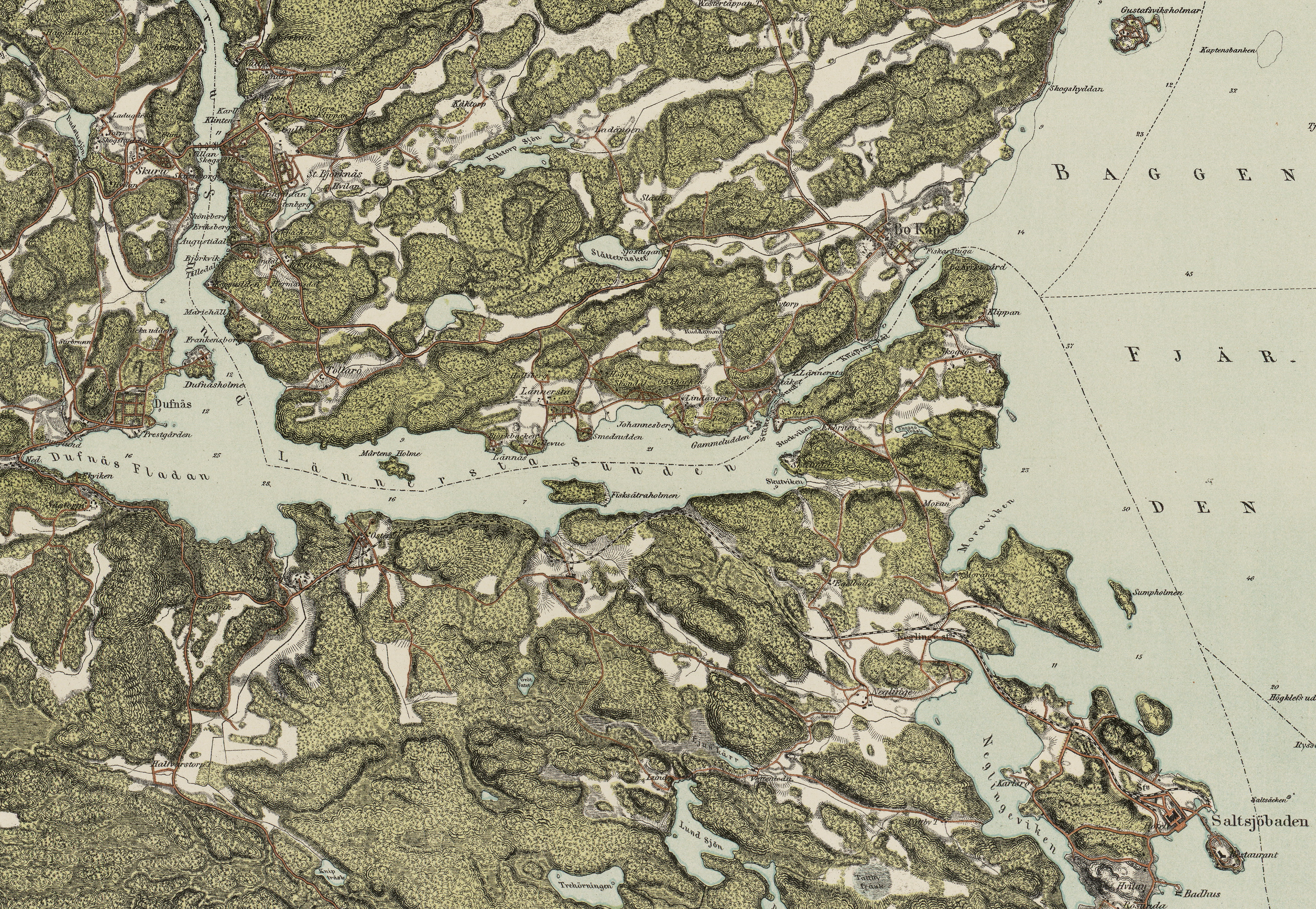 Trakten omkring Stockholm i IX blad VIII. ÖSTRA BLADET med Lännerstasundet.